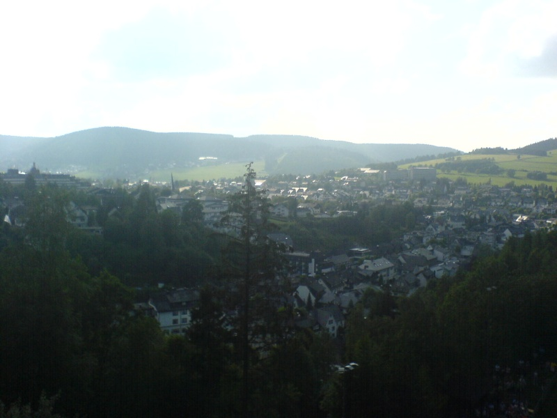 Blick vom Orenberg über Willingen